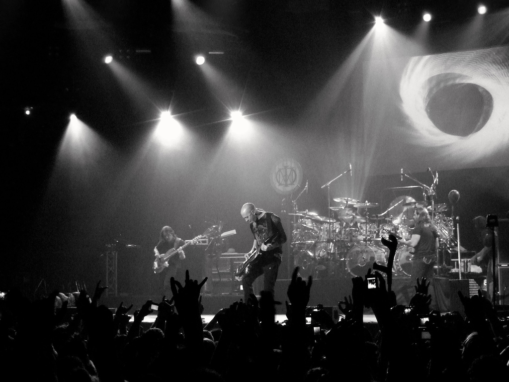 Jordan Rudes marcándose un solo con su guitarra-teclado. Atención al de la muleta xDD